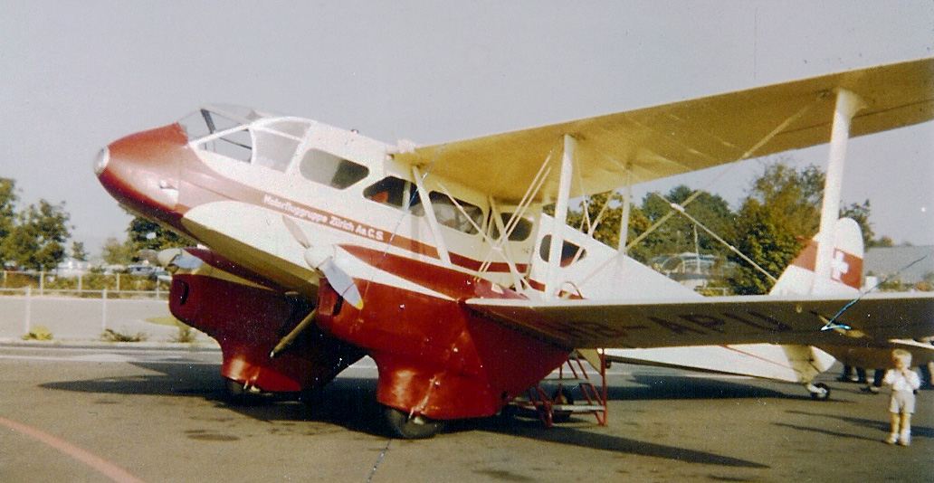 H.D. 89 Dragon Rapid